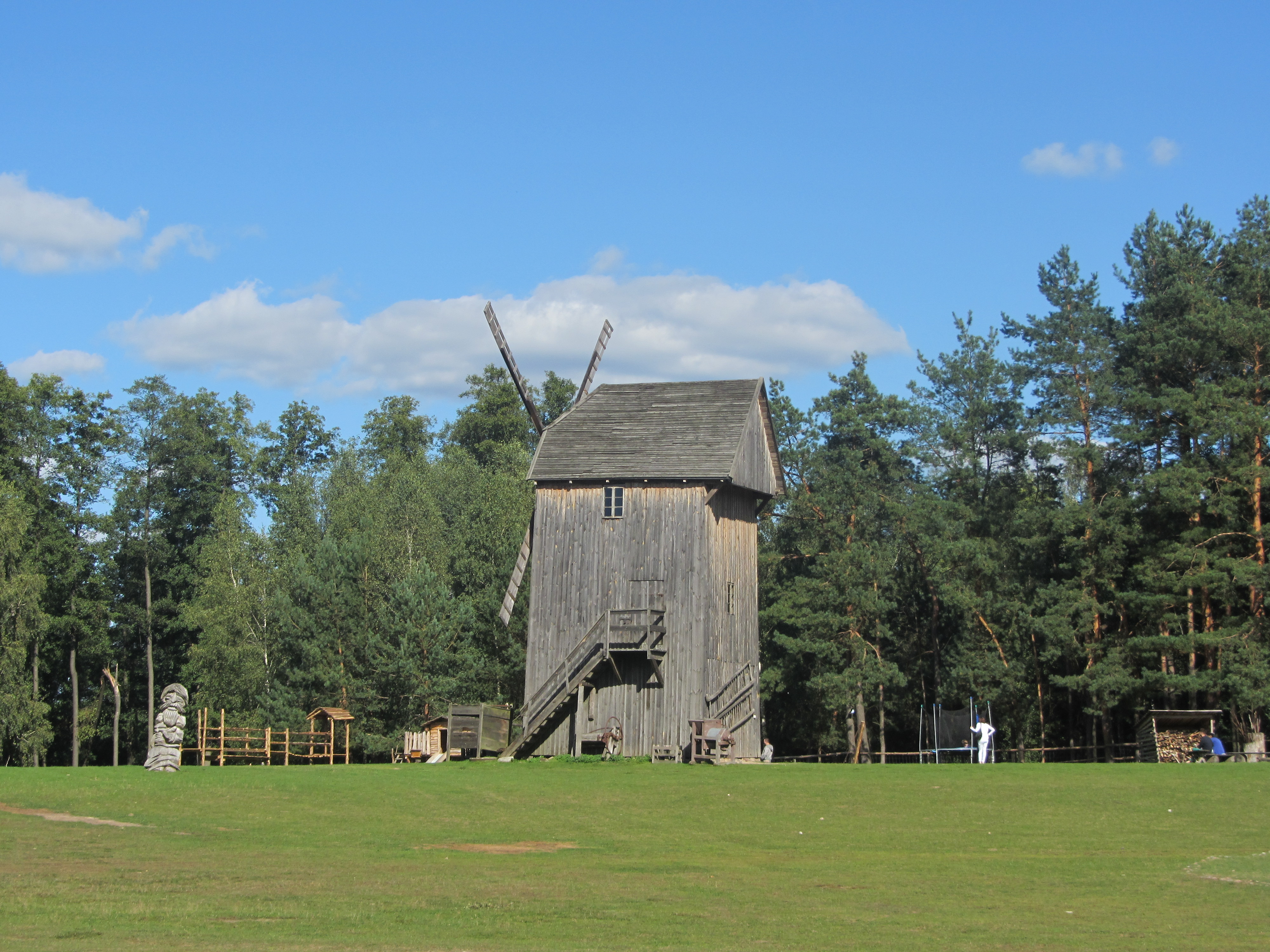 Wiatrak koźlak przeniesiony ze wsi Turośń Dolna do wsi Pomigacze (zabytek nr 436 z 20.03.1979)